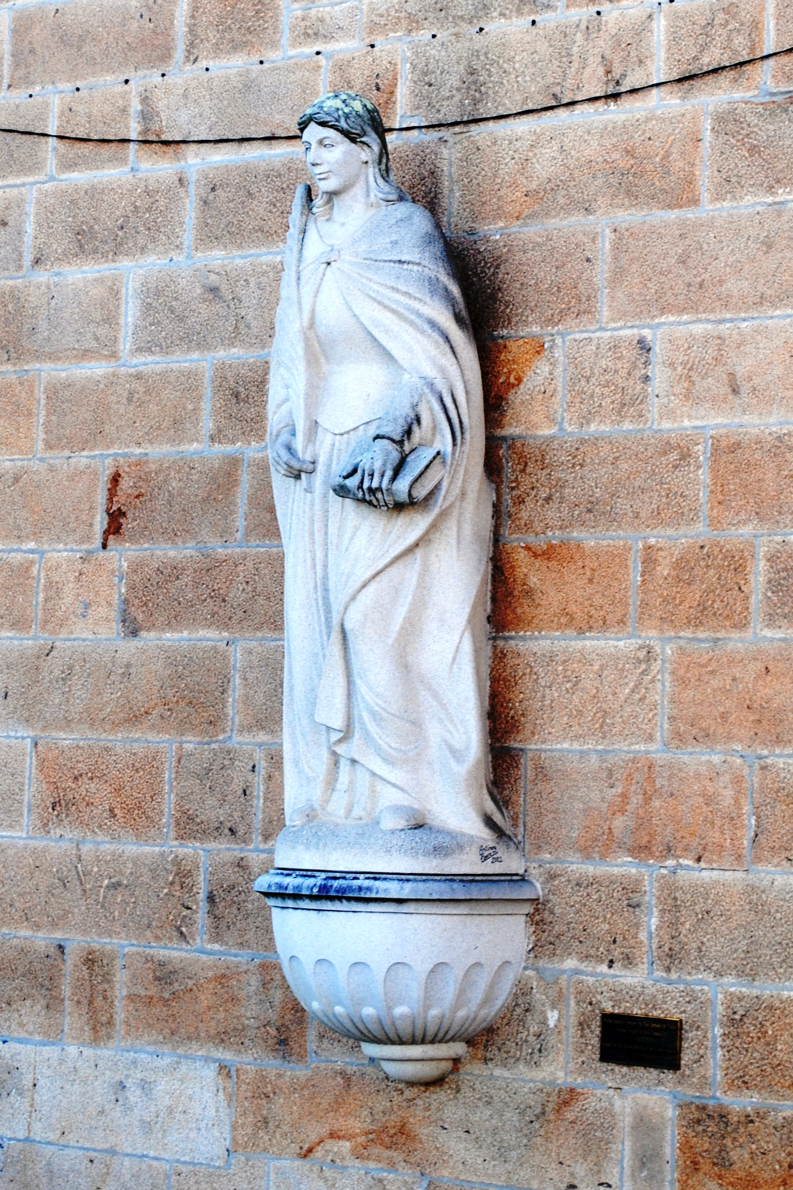 Santa Arquelaida na ábsida da igrexa de San Martiño e San Campio de Figueiró de Tomiño.